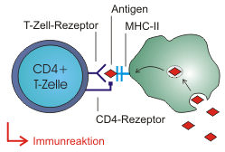 Aktivierung einer CD4+ T-Helferzelle durch Antigenpräsentation mithilfe des MHC-II-Komplexes einer Makrophage.